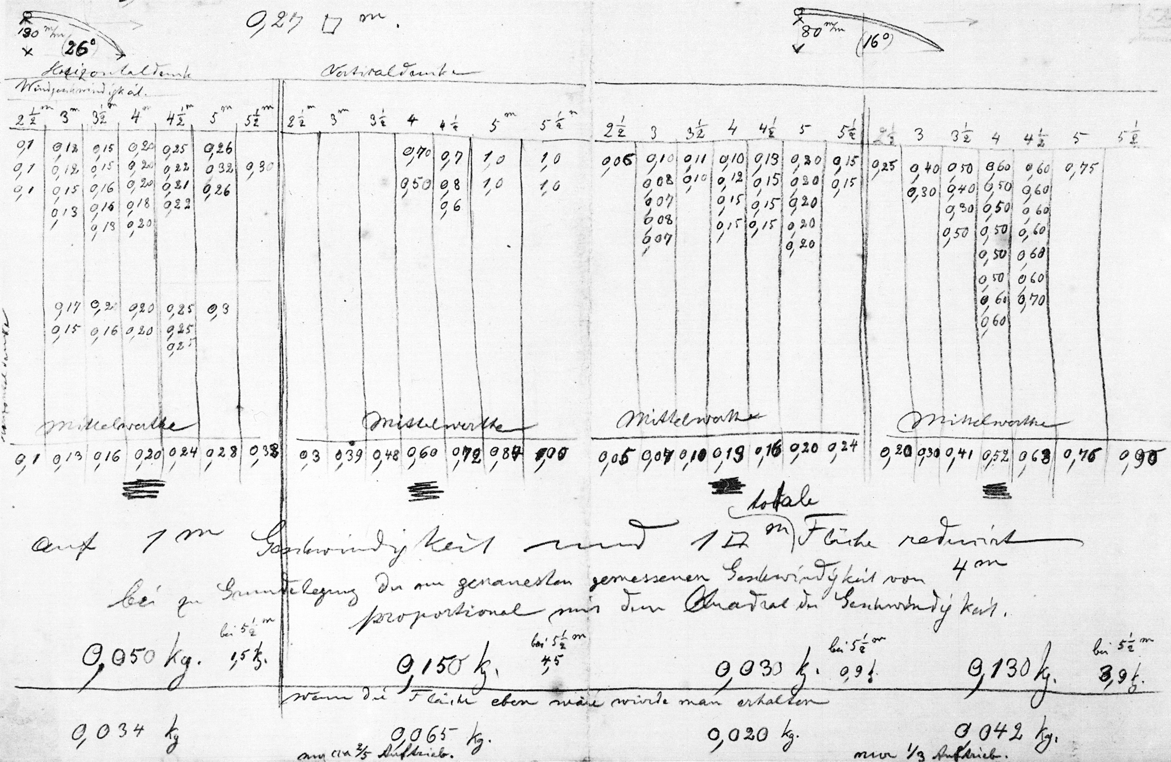 Lilienthal Auftriebsmessungen an ebenen und gewölbten Flächen 1874. Die handschriftlichen Einträge von links nach rechts und oben nach unten lauten: Horizontaldruck Vertikaldruck Windgeschwindigkeit Mittelwerte Mittelwerte Mittelwerte Mittelwerte auf 1 m Geschwindigkeit und 1 qm totale Fläche reduziert bei zu Grundelegung der am genauesten gemessenen Geschwindigkeit von 4 m proportional mit dem Quadrat der Geschwindigkeit. Wenn die Fläche eben wäre würde man erhalten nur ein 2/5 Auftrieb. nur 1/3 Auftrieb.